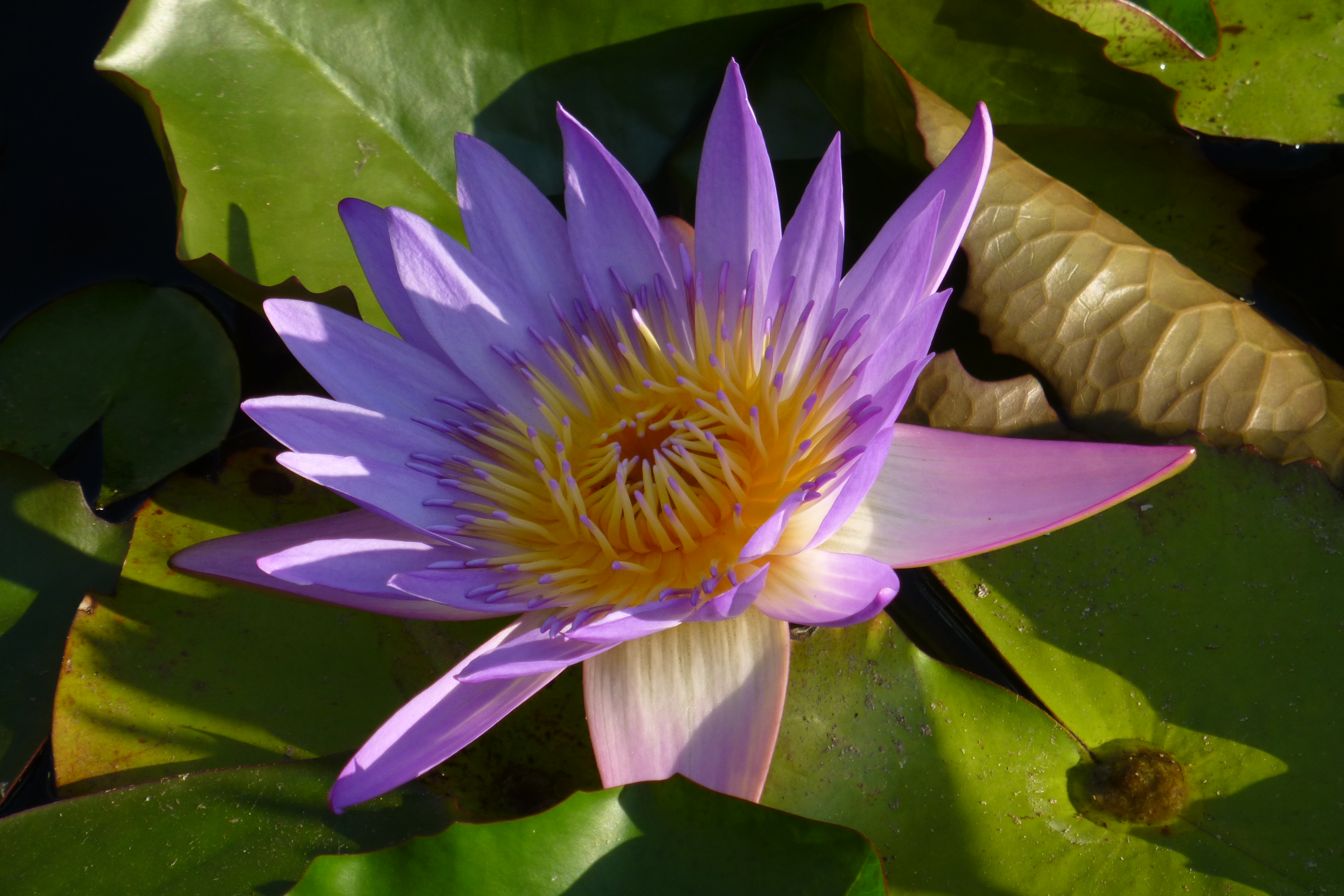 שׂרונה היא המושבה הרביעית שהקימו הגרמנים הטמפלרים בארץ ישראל במחצית השנייה של המאה ה-19. המושבה הוקמה ארבעה קילומטרים צפונית ליפו, ואחרוני בתיה שוכנים כיום בתל אביב בין שדרות שאול המלך מצפון, דרך בגין במזרח, רחוב הארבעה מדרום, ומגרשי החנייה של אחוזות החוף ממערב. מקצתם נמצאים היום בתוך בסיס הקריה.